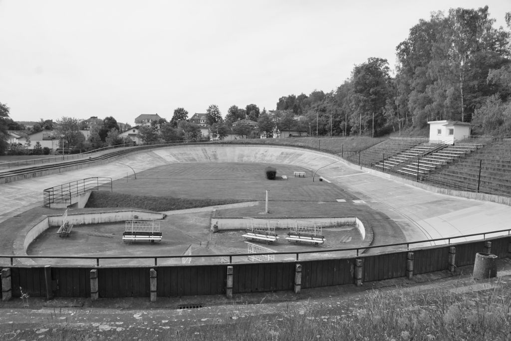 Areal der Geraer Radrennbahn